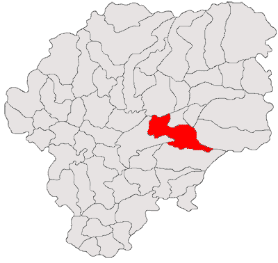 Categorie:Hărţi ale judeţului Bistriţa-Năsăud